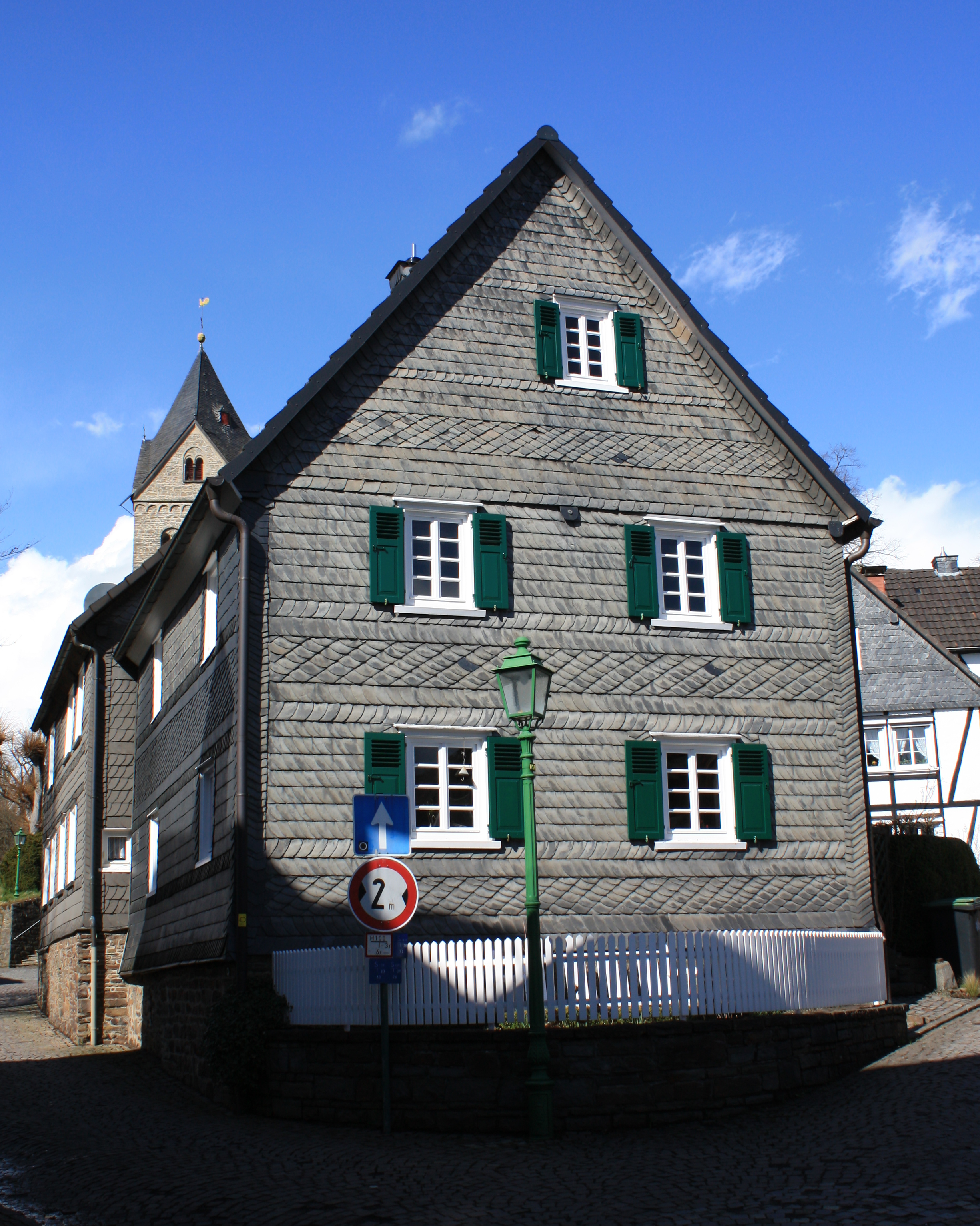 Morsbach Kirchstraße 16. Fachwerkhaus mit zwei verschieferten Seiten. Baudenkmal der Gemeinde Morsbach auf der Grundlage des Denkmalschutzgesetzes Nordrhein-Westfalen (DSchG NRW). (IMG 5701)